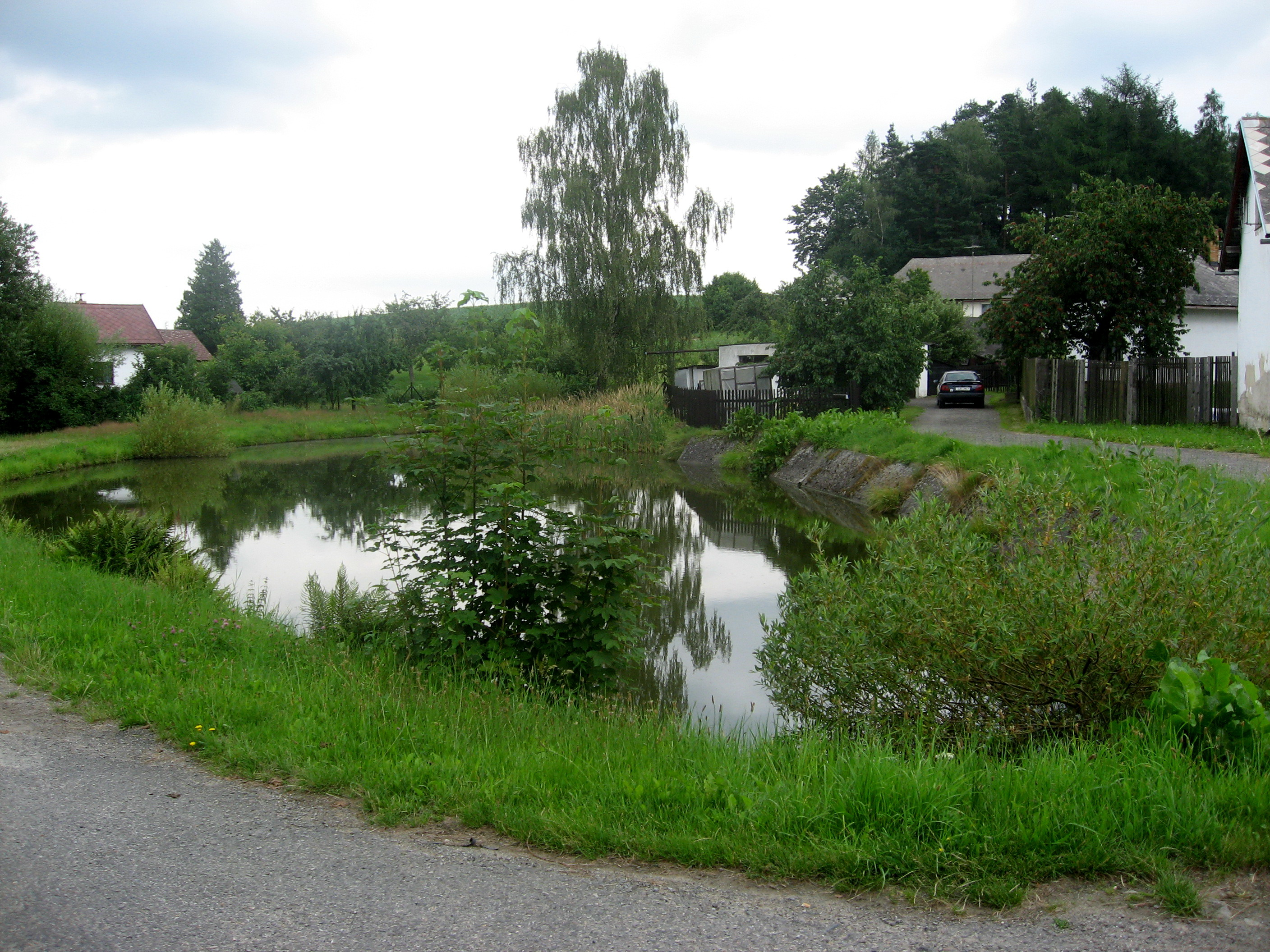 Plačkov, rybník ve vsi